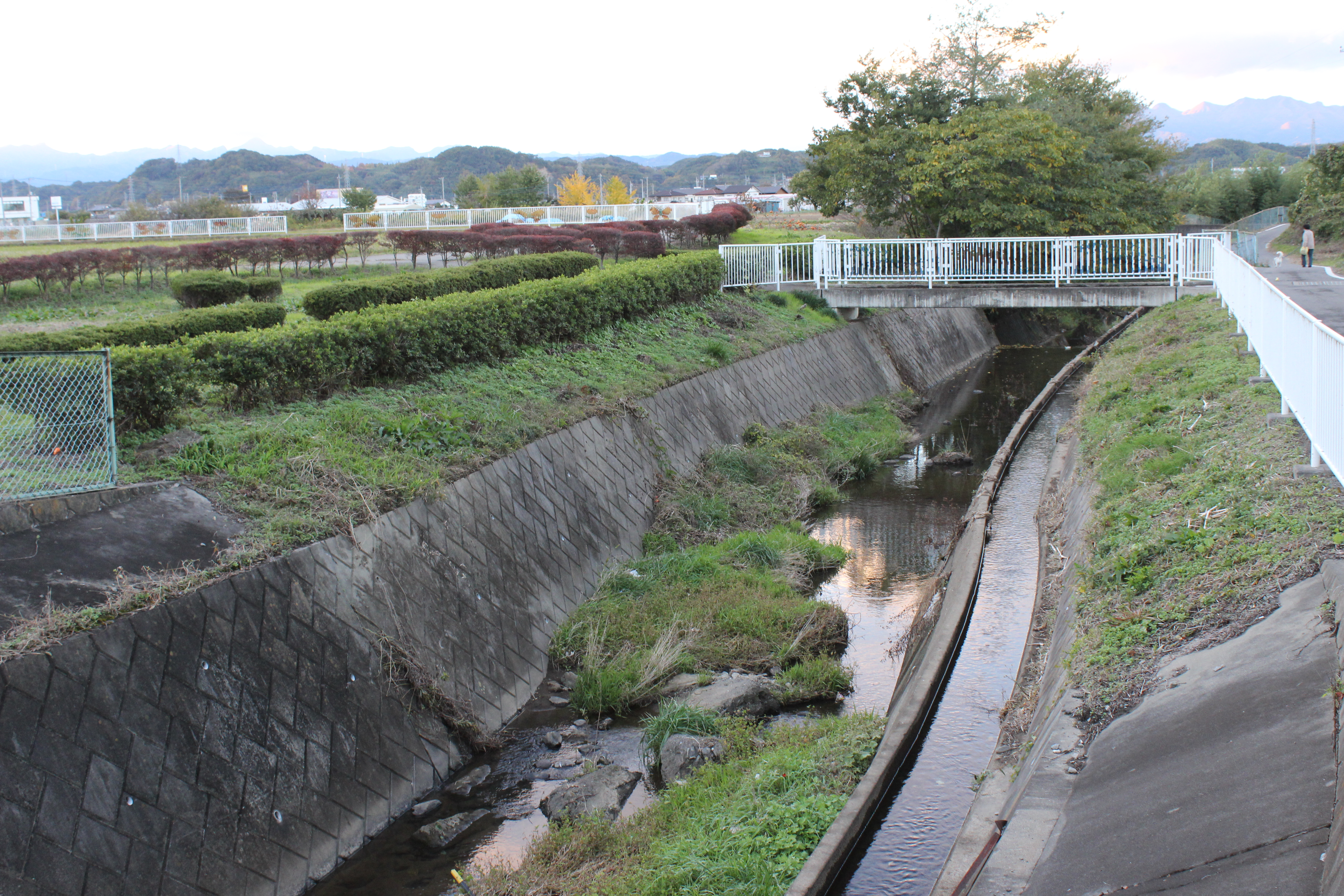 利根川水系 三途川。甘楽町立新屋小学校付近より下流方向（群馬県甘楽郡甘楽町大字天引）。